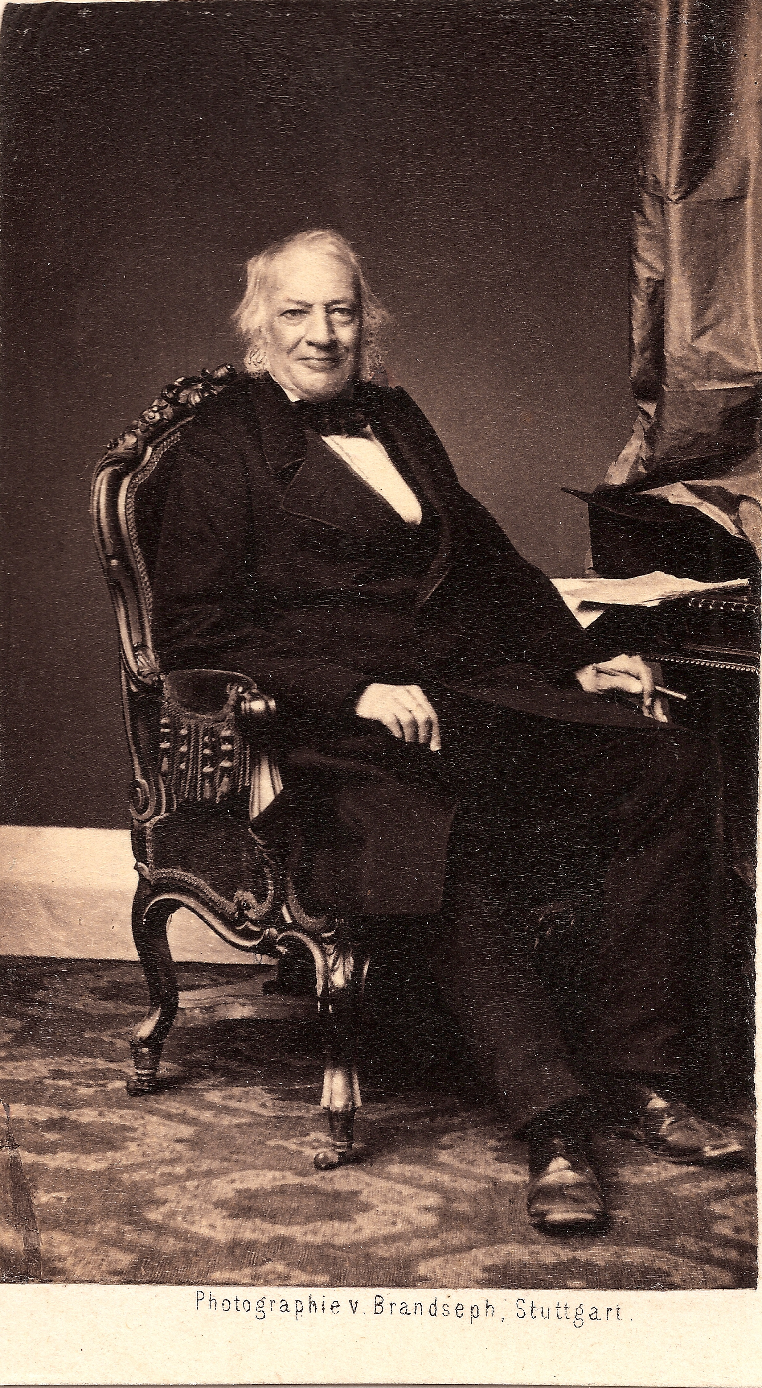 Emil Elben, Dr. phil., Sohn des Christian Gottfried Elben, war Redakteur des Schwäbischen Merkurs und verheiratet mit seiner Cousine Luise Conradi, einer Tochter des Leopold Conradi, auf einer Carte de Visite, Fotografie von Friedrich Brandseph, Abzug auf Albuminpapier um 1862